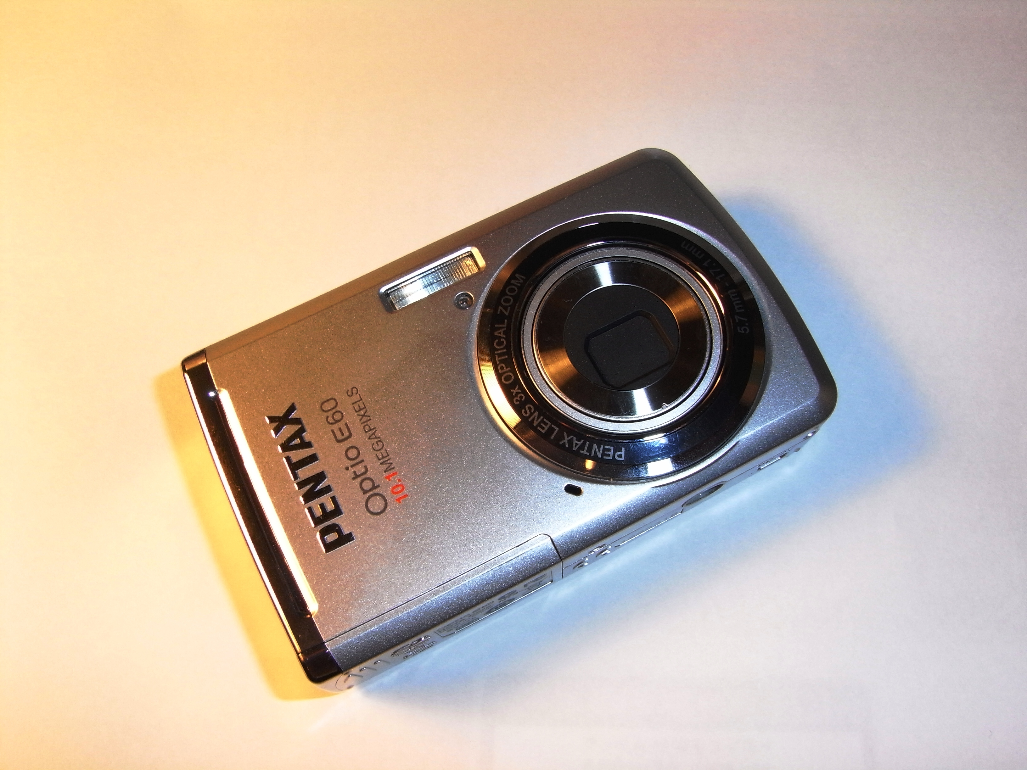 ペンタックス (Pentax) Optio E60